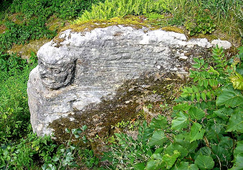 Burg Lichtenstein, Ruine der Nordburg (Gemeinde Pfarrweisach, Landkreis Haßberge, Unterfranken). Maskaron (um 1845). Eigene Aufnahme, Aug. 2007 / Lichtenstein castle (Ruin of the northern castle) near Pfarrweisach (Lower Franconia, Germany). Mascaron (ca 1845). Own photo, Aug. 2007